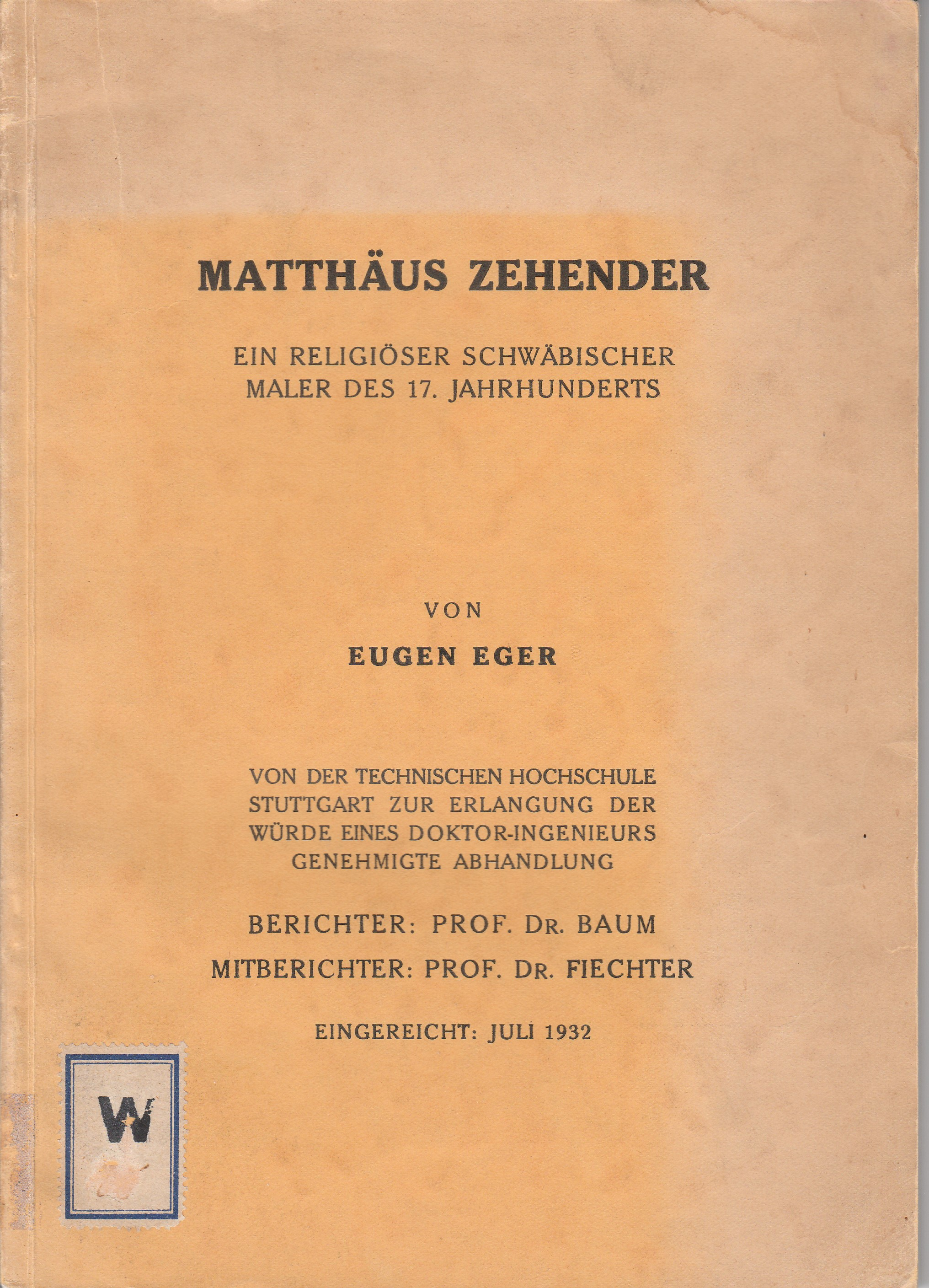 Deckblatt Diss. Eugen Eger aus der Bibl. des Franziskanerklosters Ulm. Privatbesitz